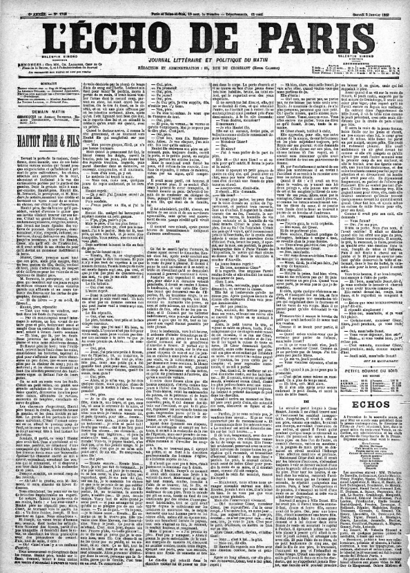 Première page du quotidien "L'Écho de Paris", 6e année, 5 janvier 1899